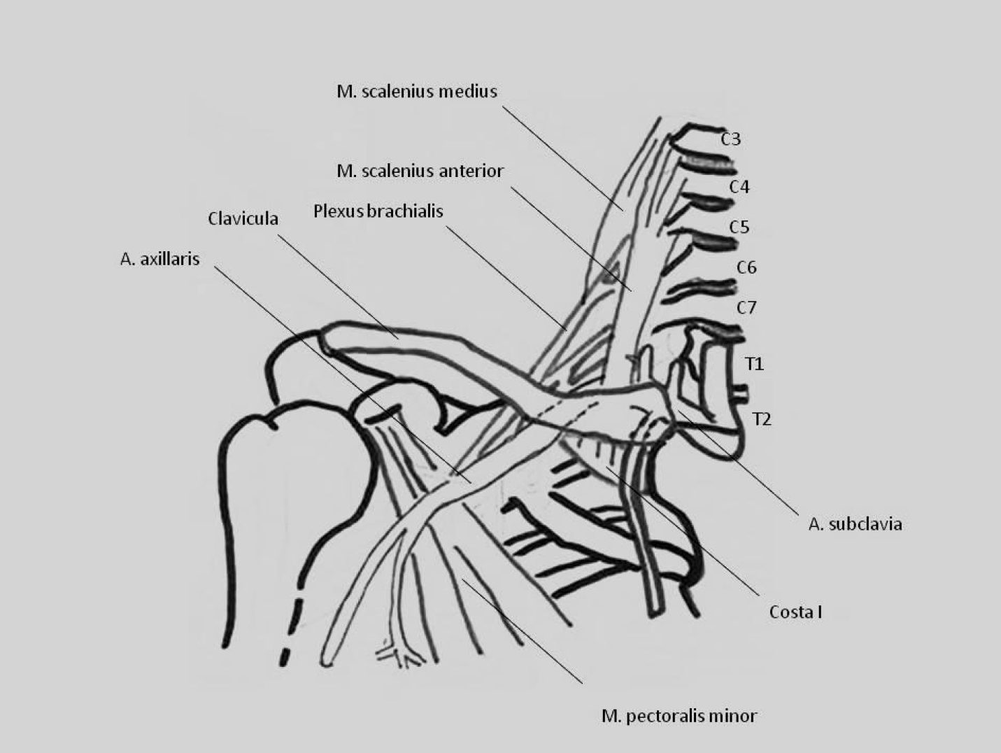 Thoratic outlet